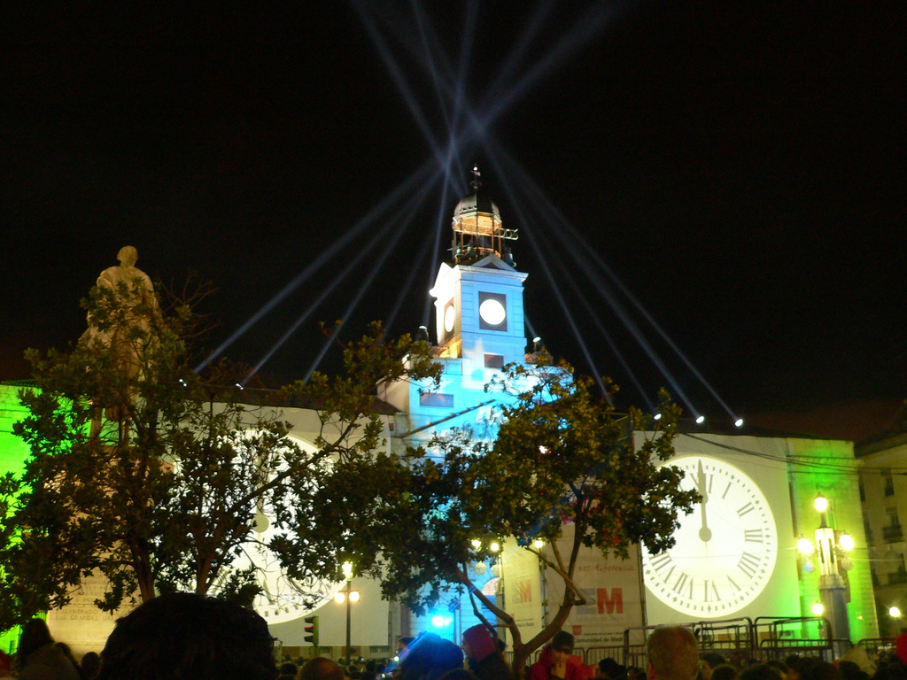 Nochevieja en la Puerta del Sol de Madrid (España), año 2006.